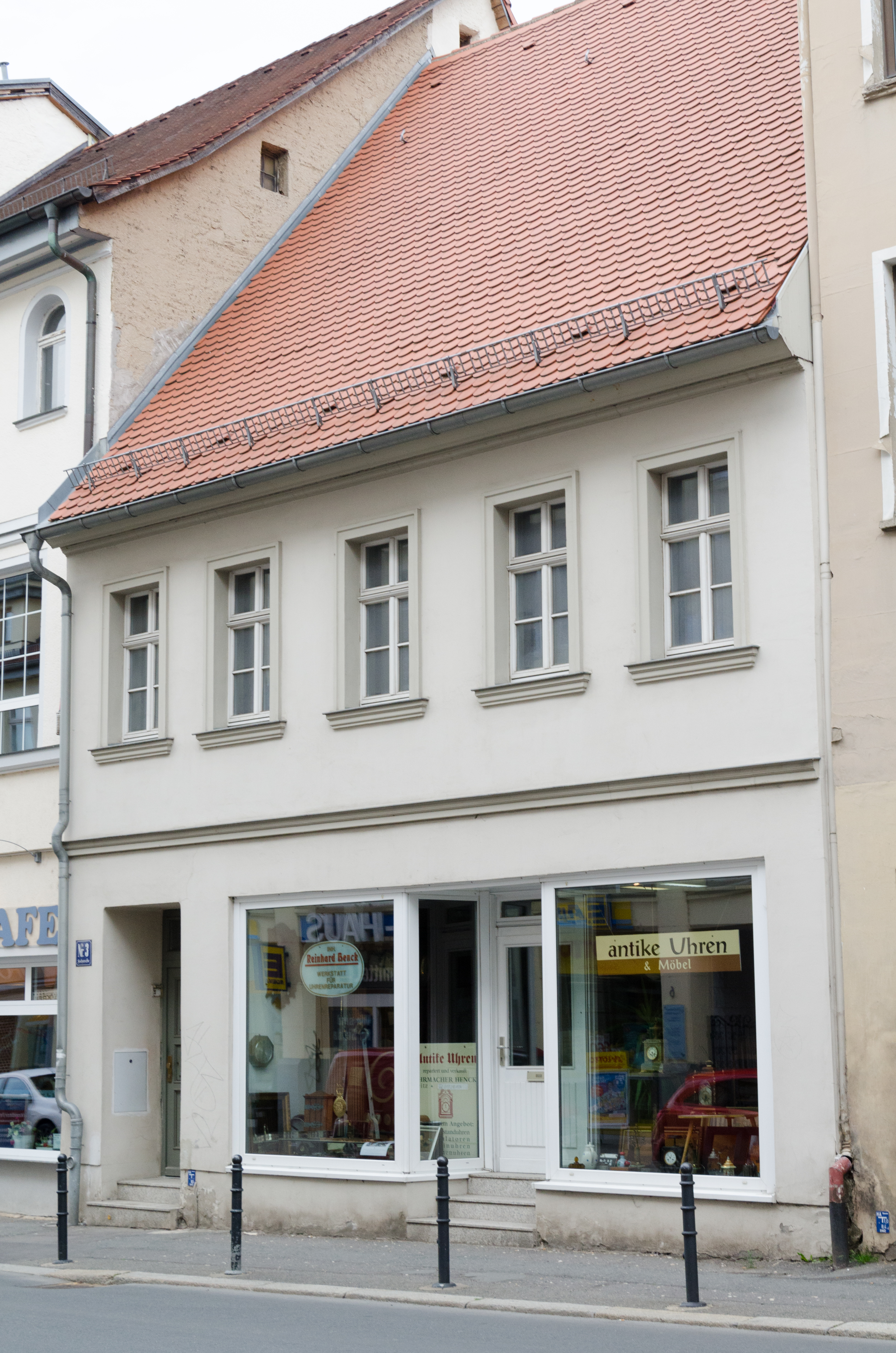 Zeitz, Fischstraße 3